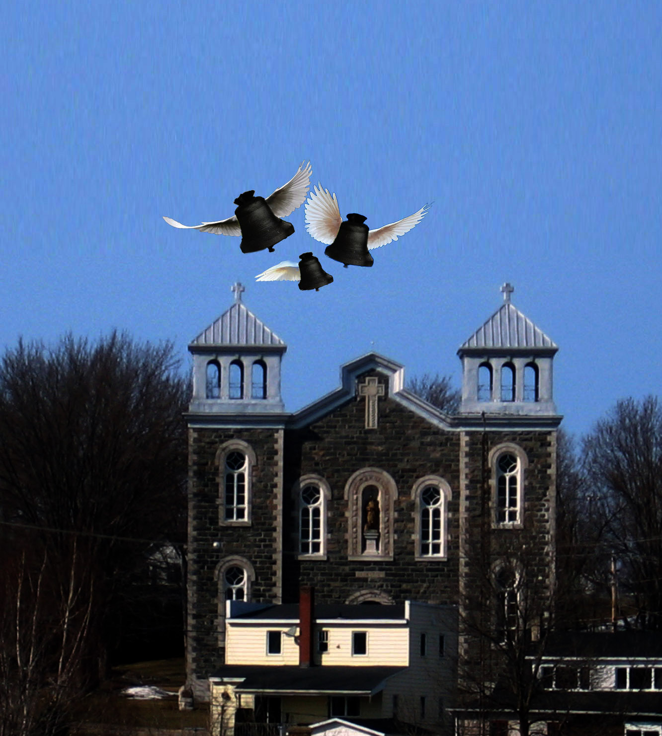 Église de Sainte-Geneviève-de-Batiscan. Au Jeudi saint, la légende veut que les cloches des églises partent pour Rome. À partir d'une photo déjà disponible sur Commons , prise en 2010 par Harfand, j'ai ajouté les cloches (à partir de la photo d'une des cloches de cette église) et les ailes, et j'ai assombri la photos pour donner l'ambiance d'une soirée.